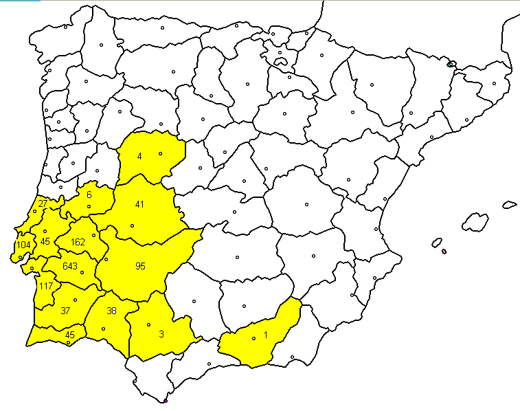 Distribuição por distrito de placas de xisto gravadas conforme base de dados ESPRIT